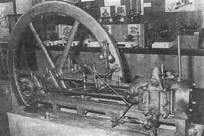 Quelle: Musée des arts et métiers, Conservatoire national des arts et métiers, Paris